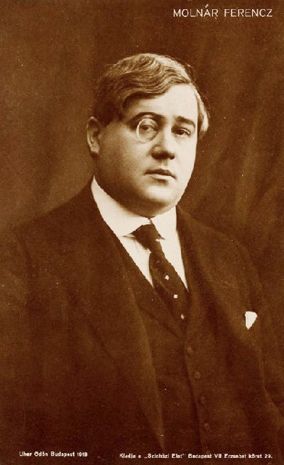 Molnár Ferenc portréja. Levelezőlap, 1918, fotó: Uher Ödön National Széchényi Library LocationBudapestCoordinates47° 29′ 53.34″ N, 19° 02′ 14.4″ E Established1802Authority control : Q1063819 VIAF: 137912193 ISNI: 0000 0001 2167 0554 ULAN: 500306655 LCCN: n79076057 NLA: 35722893 WorldCat institution QS:P195,Q1063819